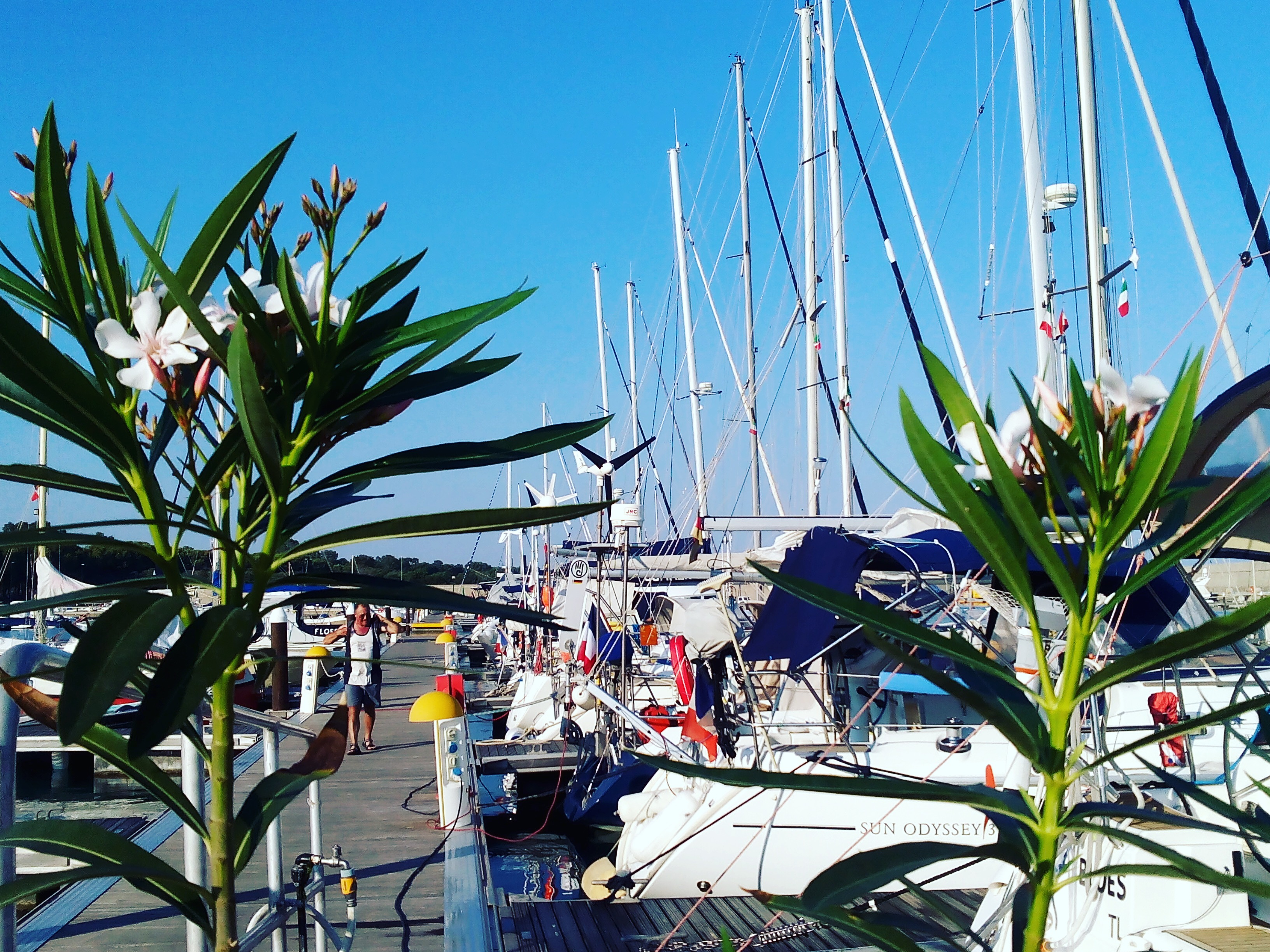 Scorcio del Porto di Roccella